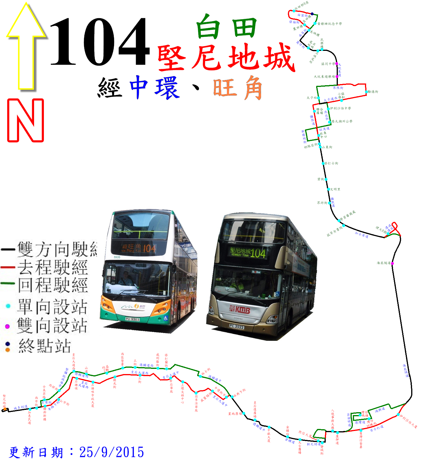 中文（香港）: 過海隧巴104線的走線圖